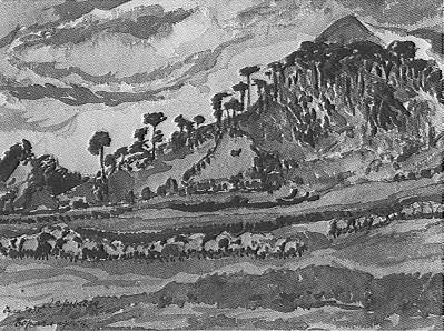 Lazar Drljaca, Idylle à Borci, 1935, aquarelle, 200 x 280 mm